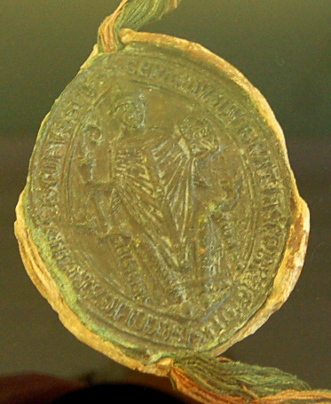 Siegel des Bremer Erzbishofs Gerhard (Gebhard)) von Bremen aus dem Jahr 1240